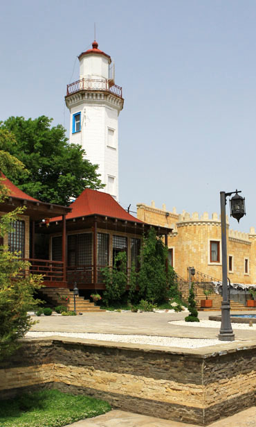 Дербентский маяк